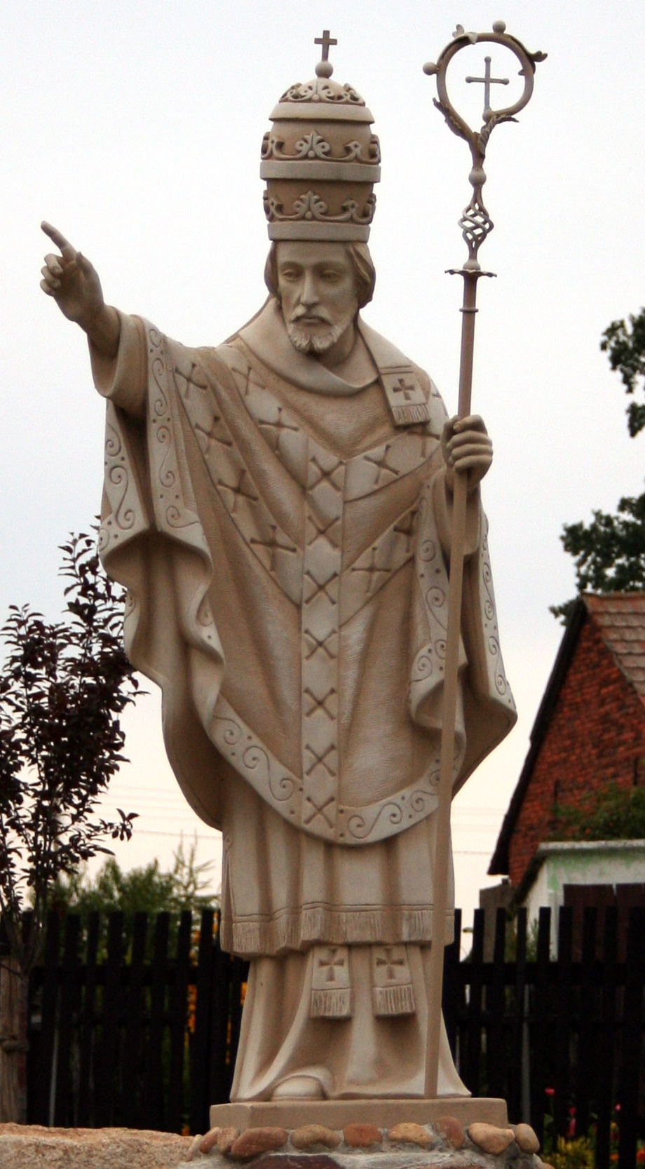 pomnik świętego Marcina w Cieszowej